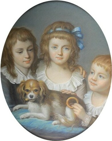 Ecole du XIXème